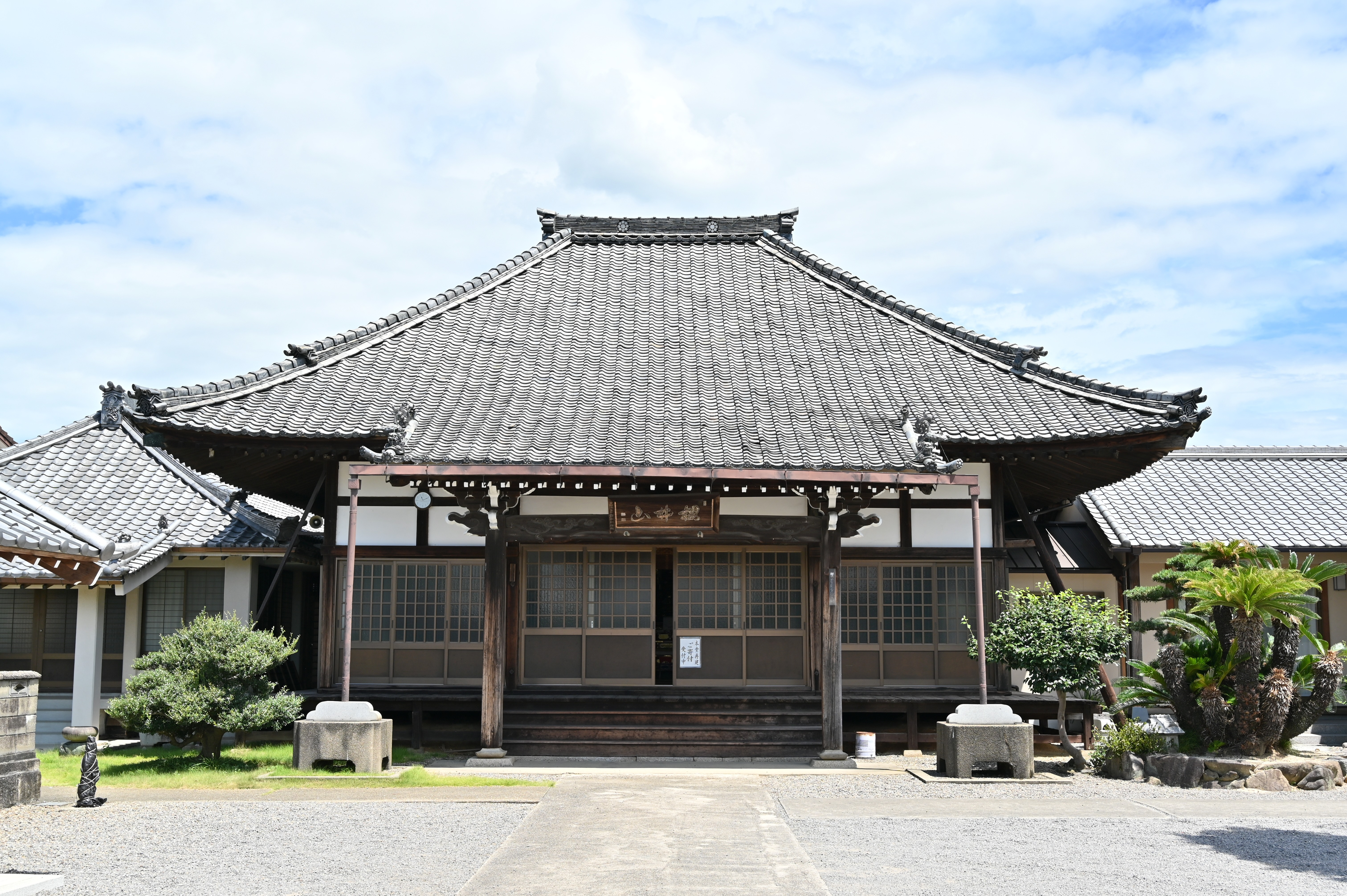 桜井山菩提寺の本堂